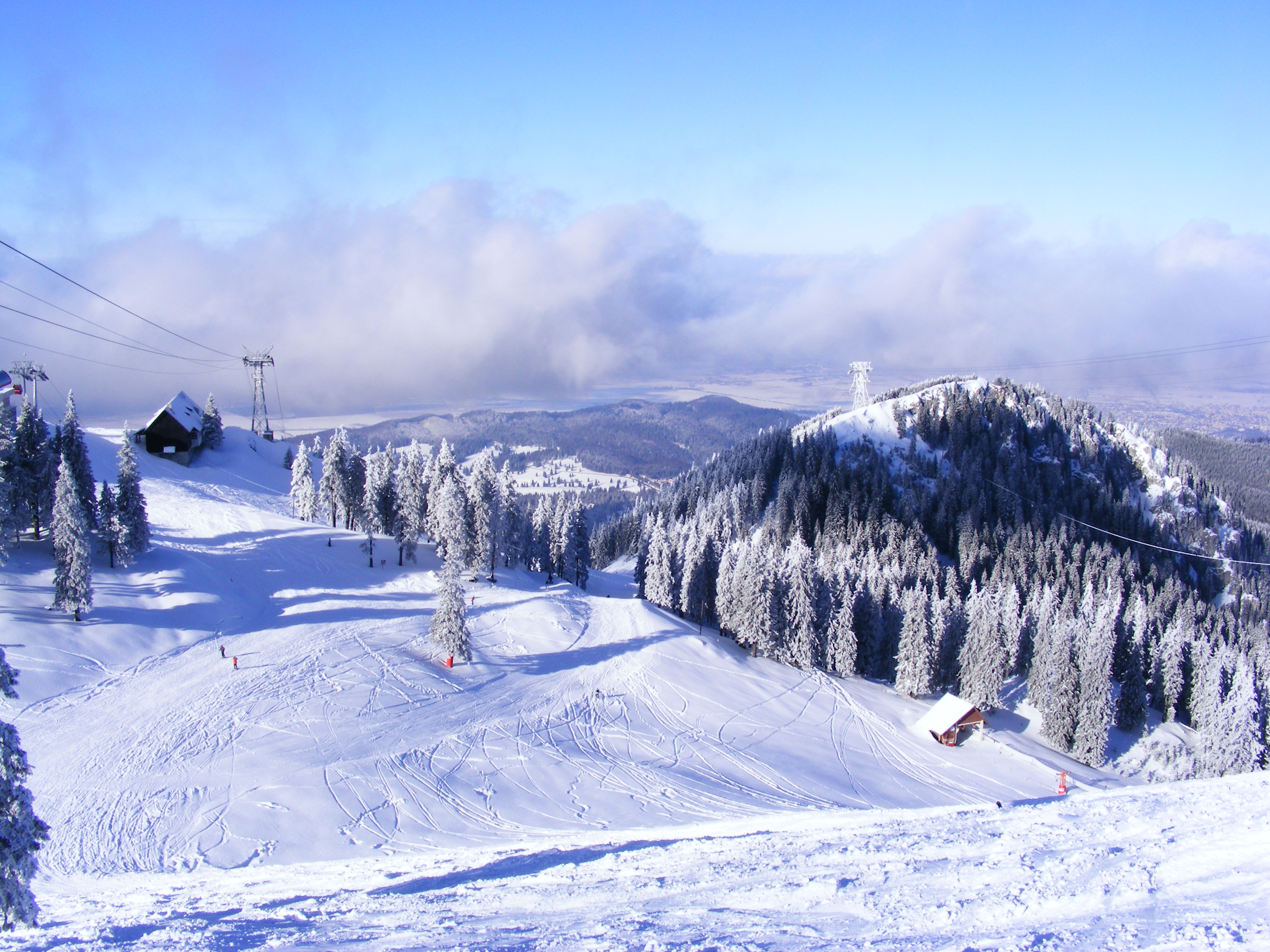 Postavaru Mountain - ROMANIA